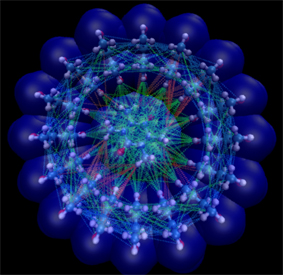 16 bit parallel processing nano brain